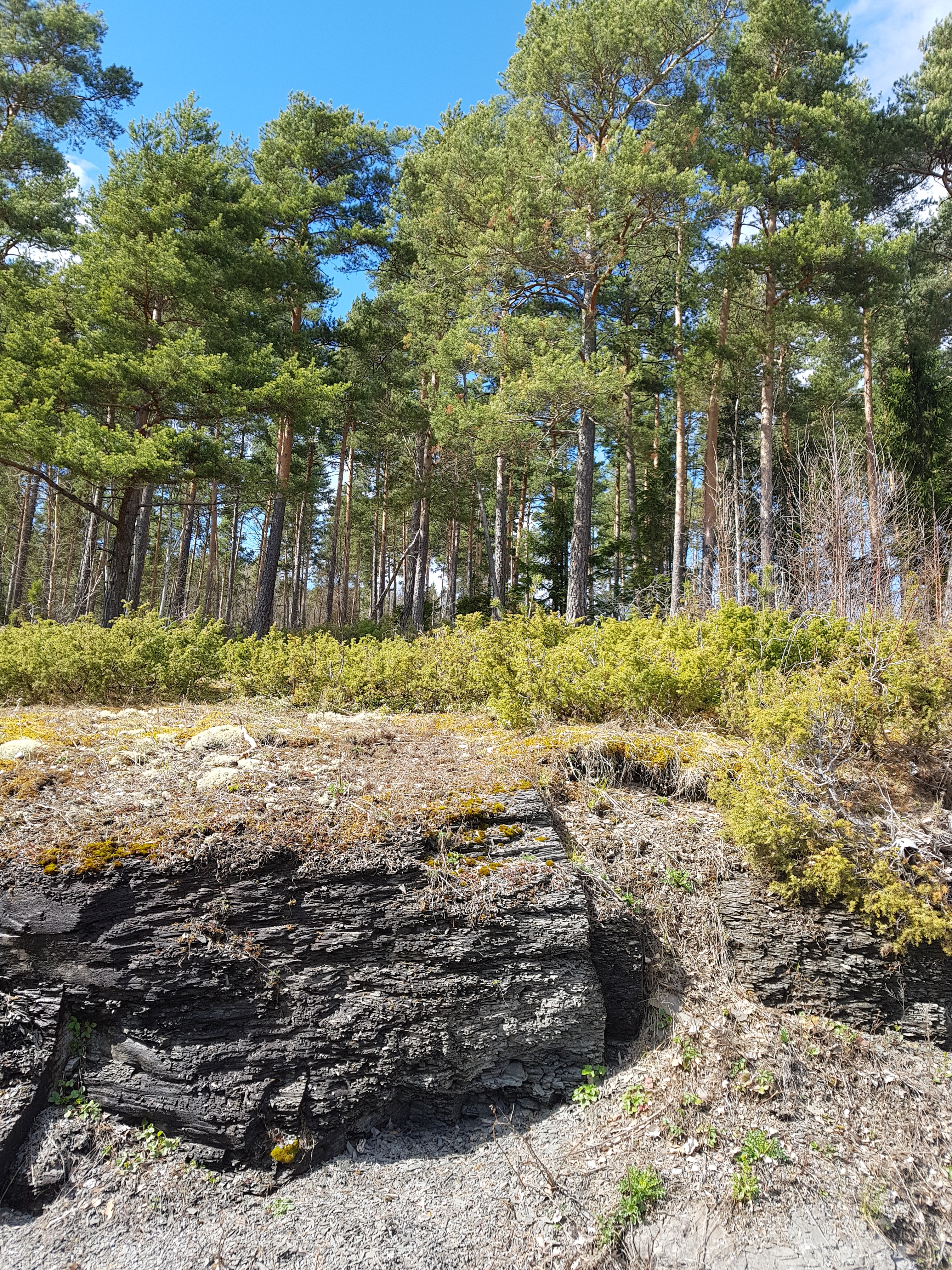 Kalkfuruskog ved Hurumåsen/Burudåsen naturreservat